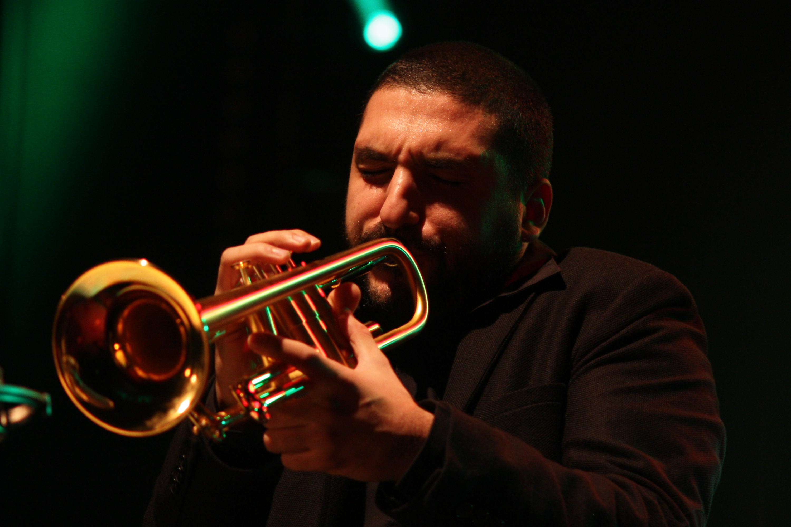 44. Deutsches Jazzfestival Frankfurt 2013: Ibrahim Maalouf mit der hr-Bigband